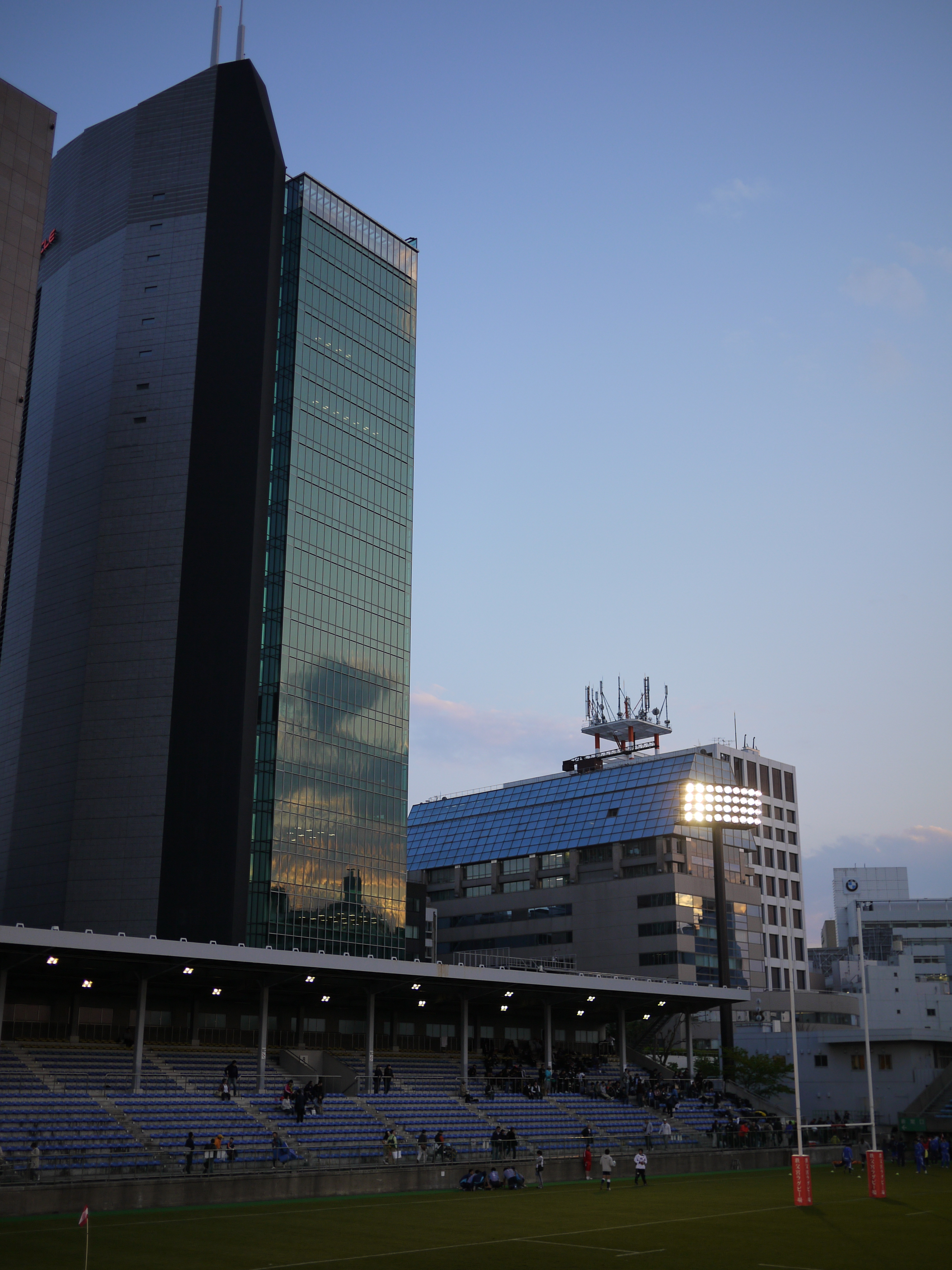 Sevens Festival